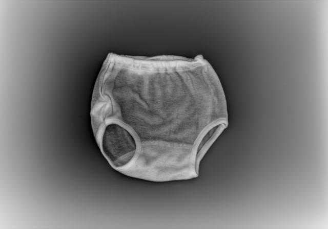 Věra Stuchelová´s photographs